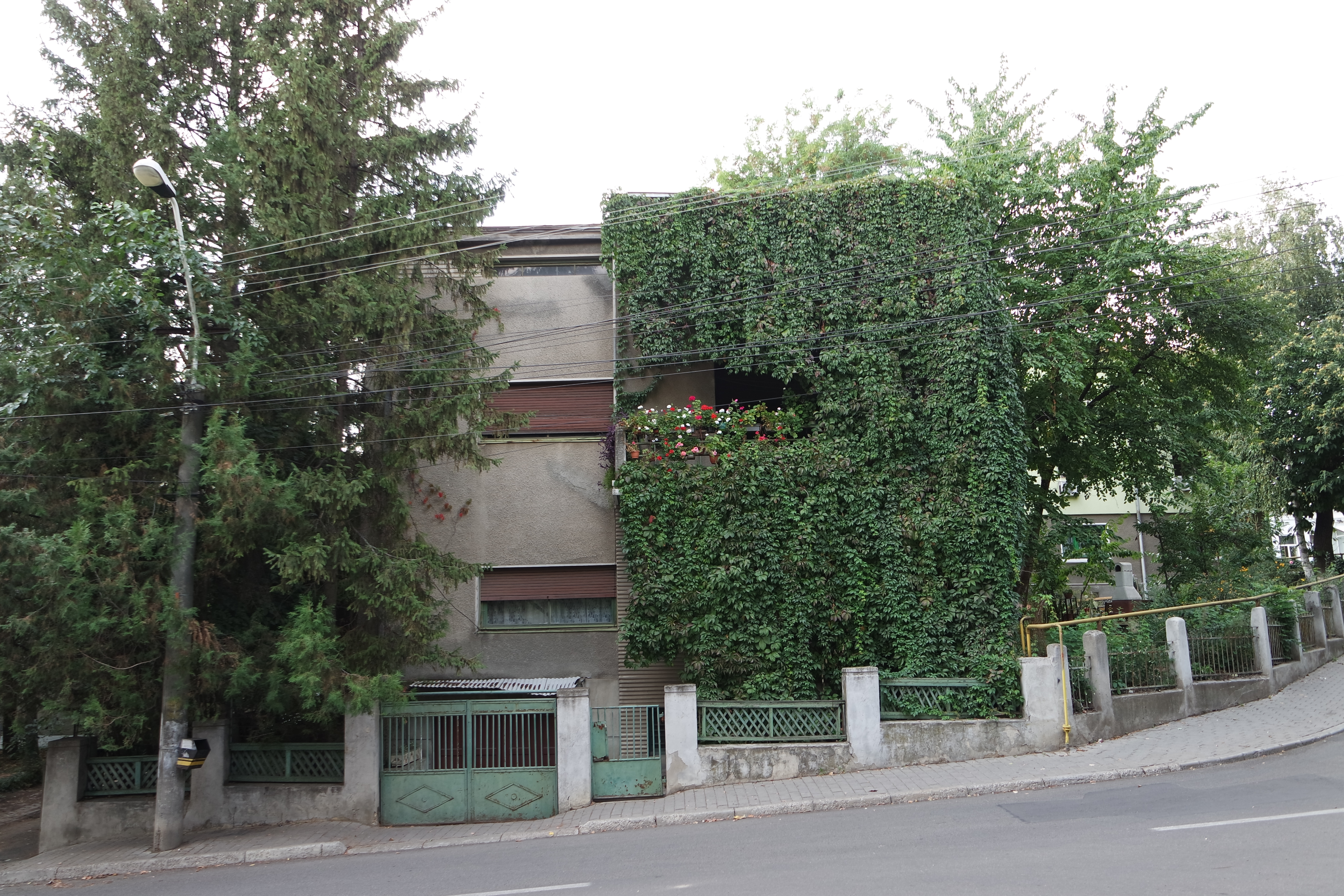 Casa - Str.Nicolae Balcescu Nr.24A, Iasi